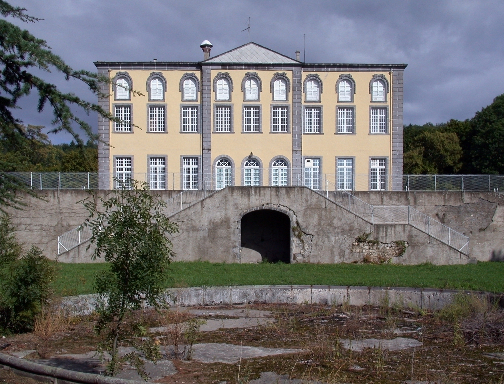 Château de Chalendrat qui a été la principale demeure de George Onslow situé dans la commune de Mirefleurs (Puy-de-Dôme) devenu aujourd'hui un Centre de Vacances. L'auteur de cette photo est User:Gegeours.